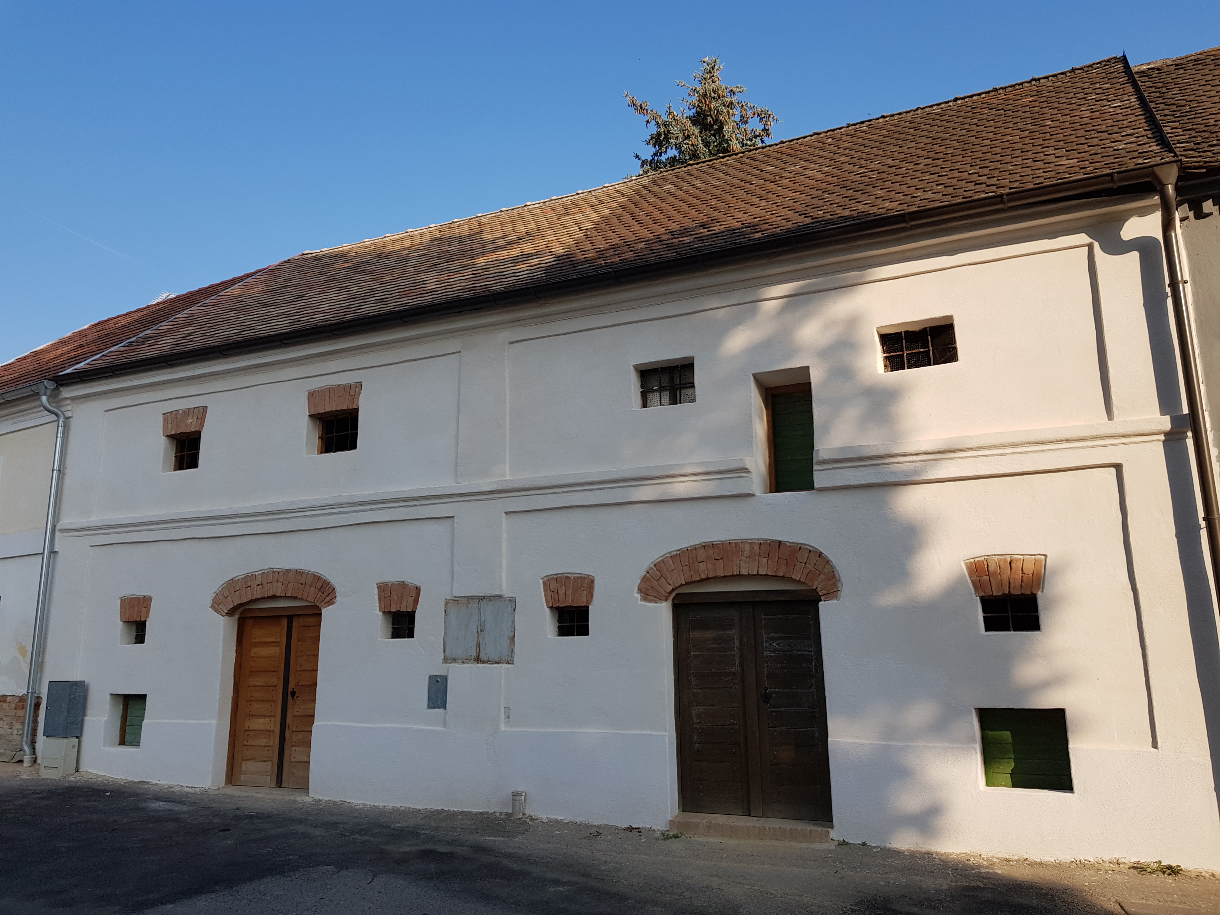 Zwei Keller in der Kellergasse "Trift" in Eichenbrunn, Bezirk Mistelbach in Niederösterreich